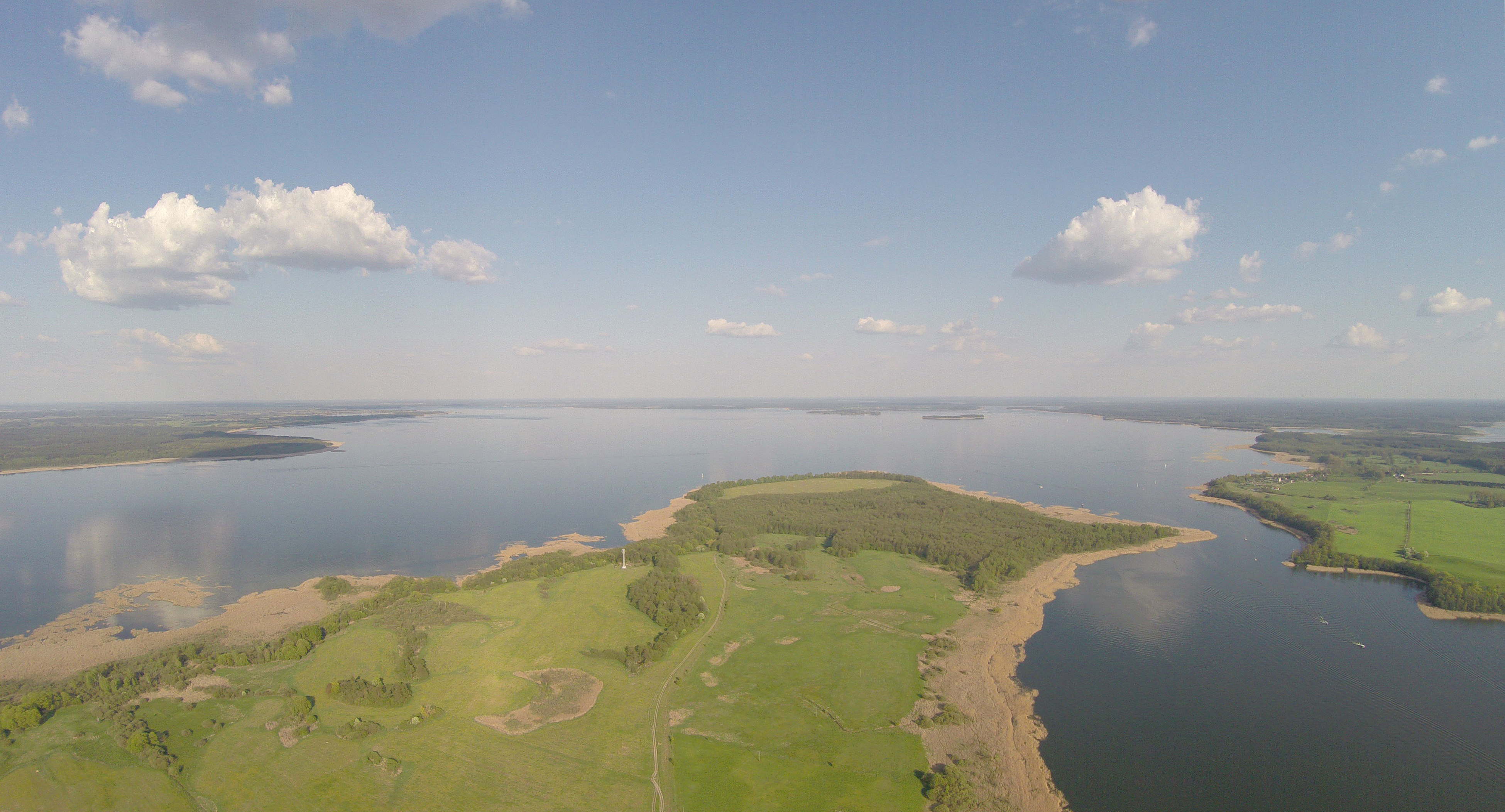 Park krajobrazowy: Mazurski Park Krajobrazowy This is a photography of protected area with CRFOP ID PL.ZIPOP.1393.PK.29